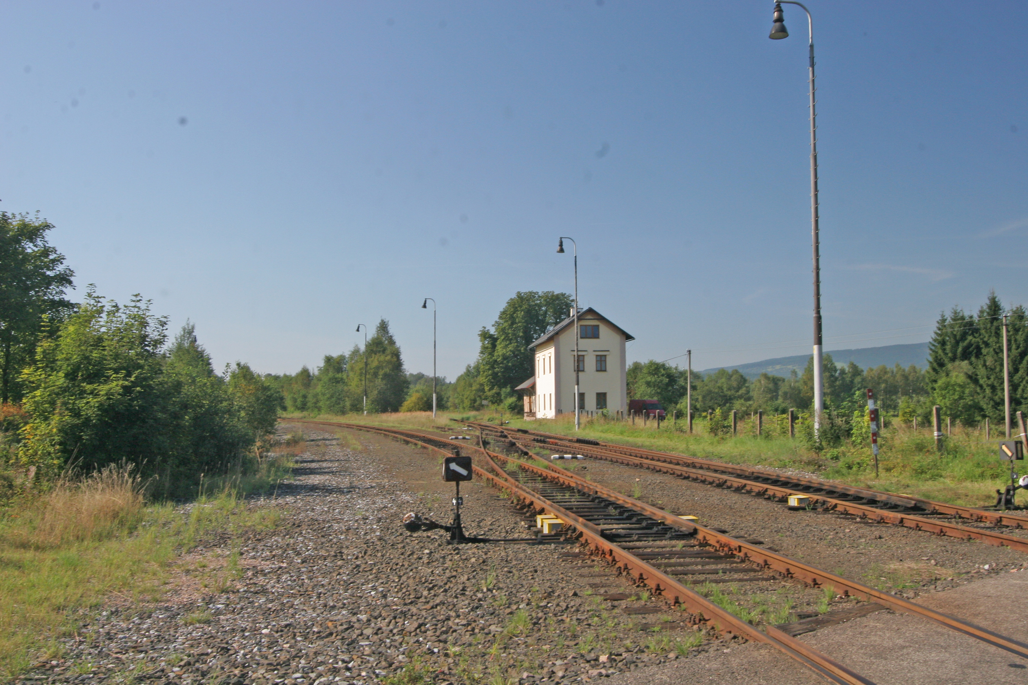 Královec nádraží ?